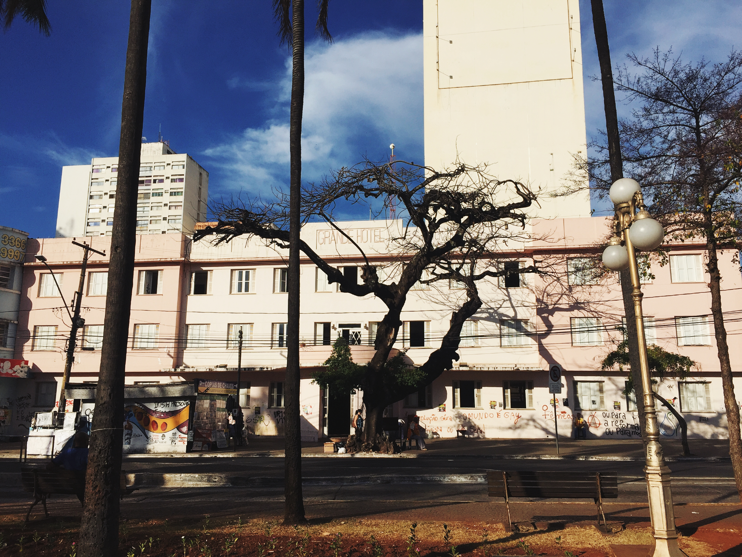 Nessa fotografia temos o Grande Hotel de Goiânia,um lugar com muita história e de uma arquitetura singular.Palco de protestos e grandes paixões.